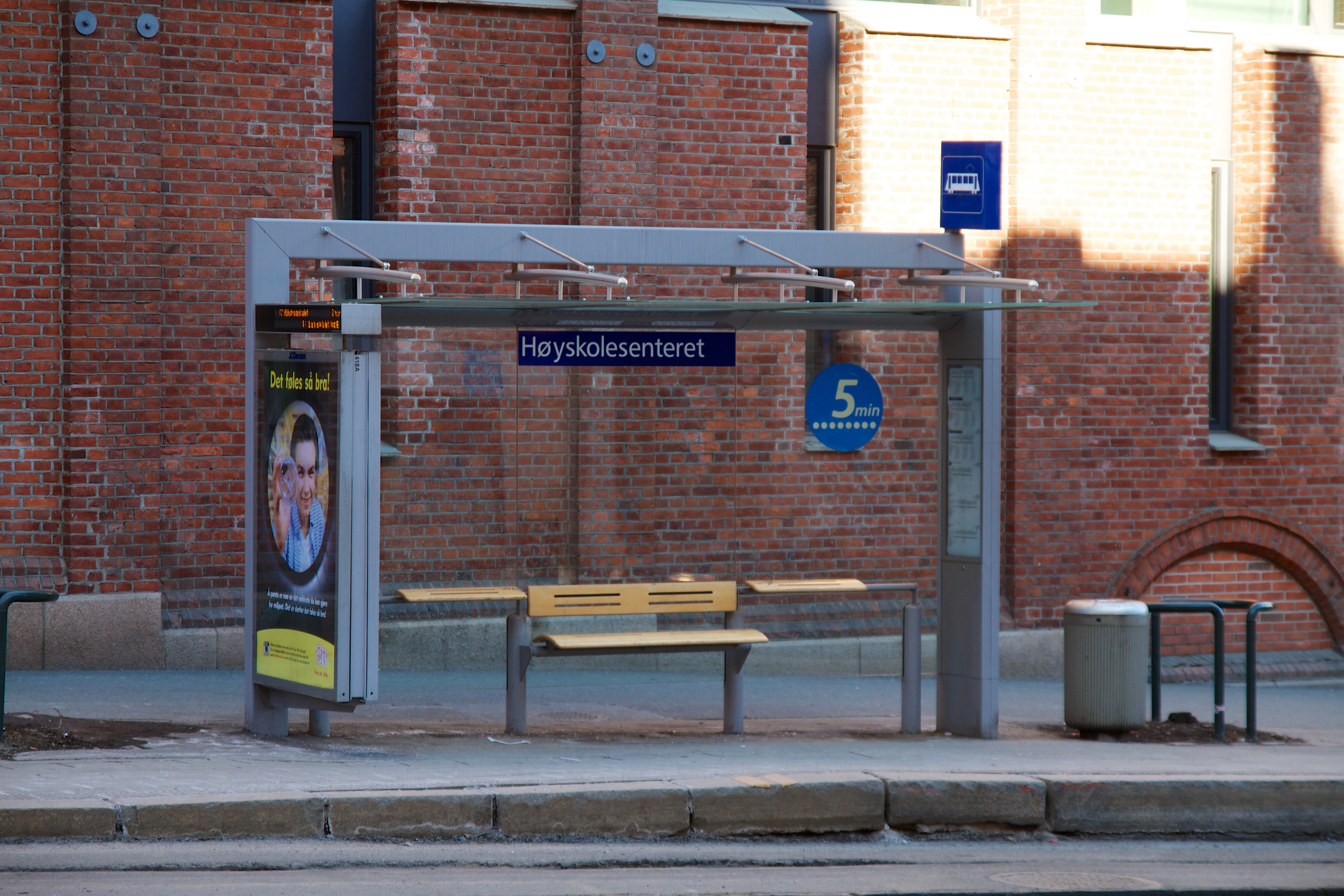 Høyskolesenteret holdeplass holdeplass i Oslo.